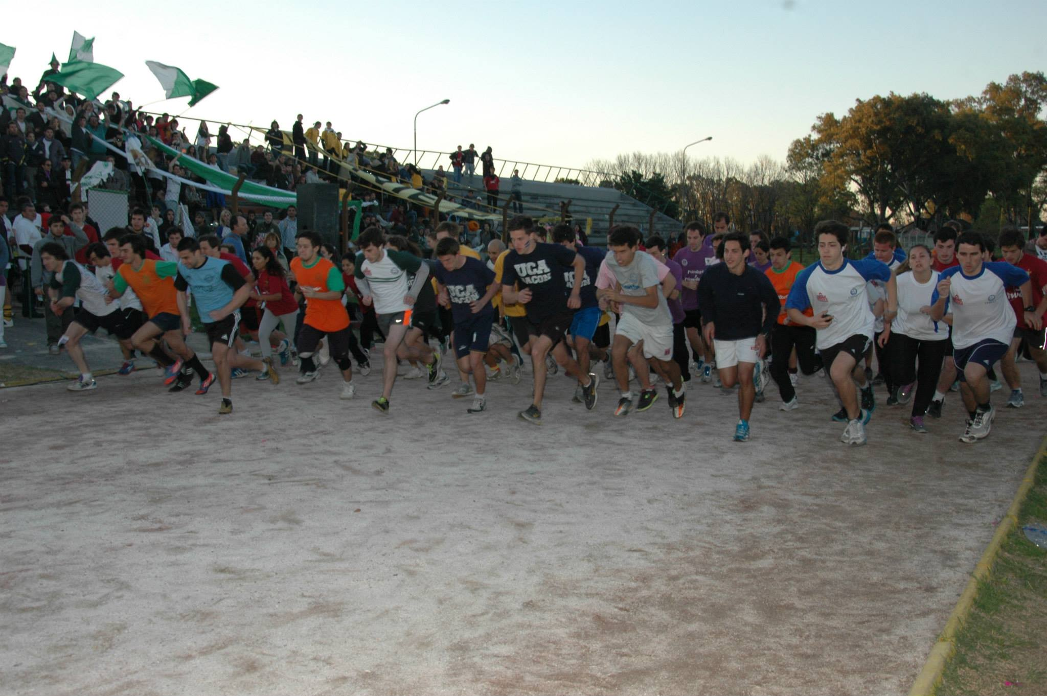 Competencia en el marco de las Olimpíadas InterUCA 2013 de la Universidad Católica Argentina